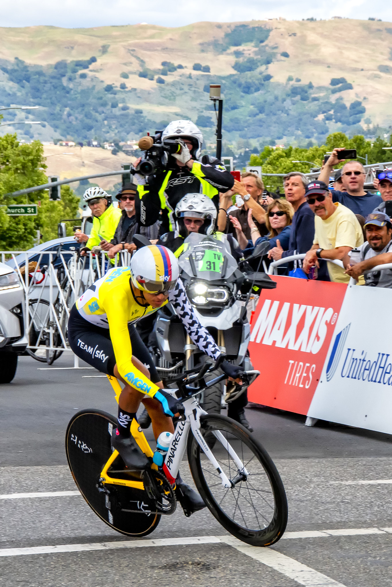 Egan Bernal durante la prueba a cronómetro de Tour de California 2018